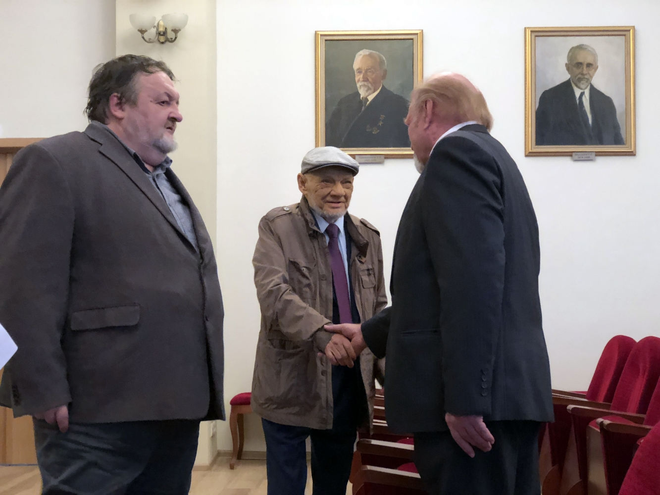 На заседании посвящённом 90-летию со дня рождения Ф. И. Козловского, в Почвенном институте им. В. В. Докучаева, Москва. С. В. Горячкин, Ю. Г. Пузаченко и В. И. Кирюшин.